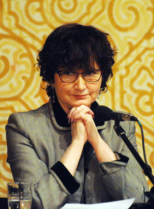 Ilona Szatmari Waldau